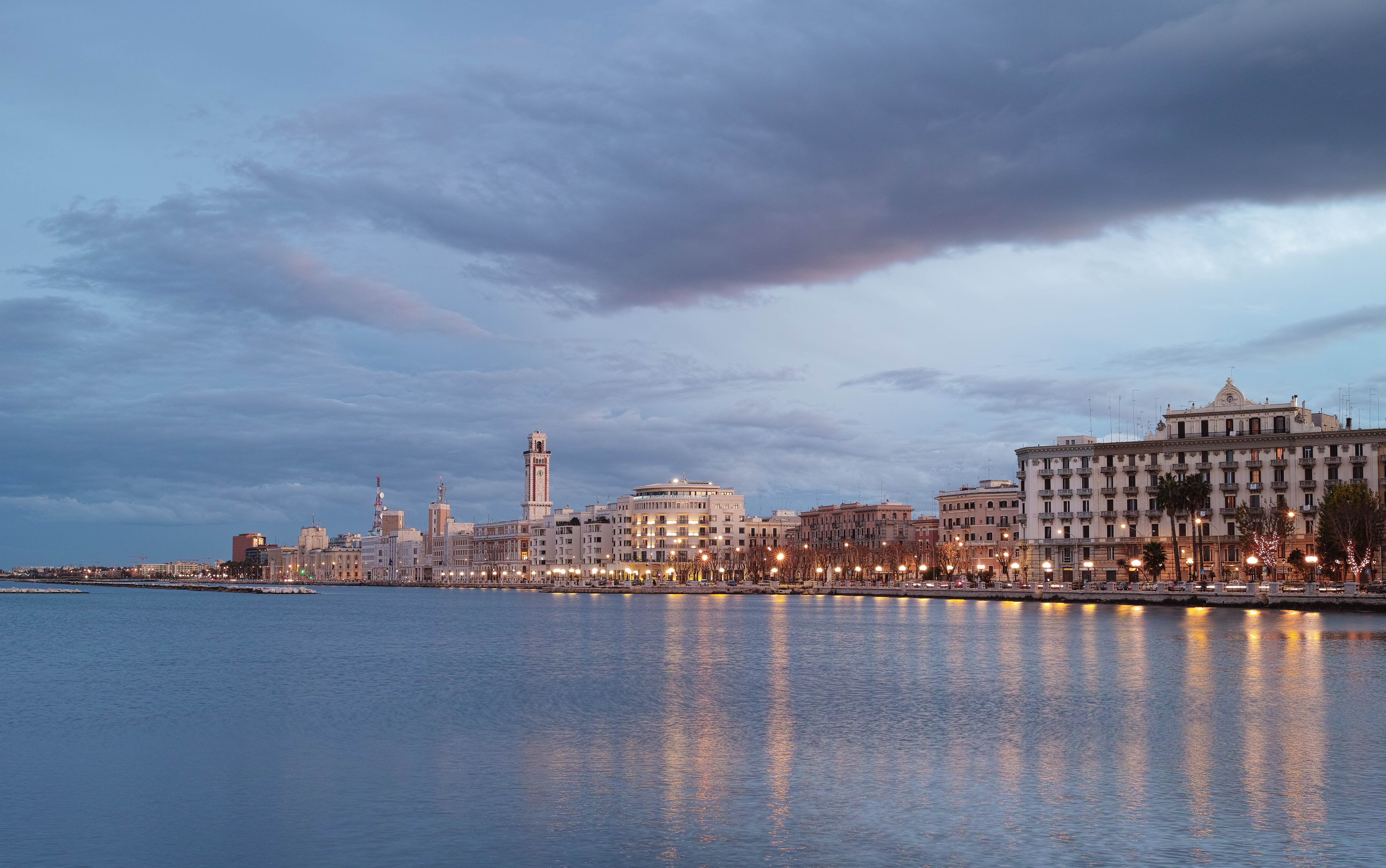 Lungomare (Bari)